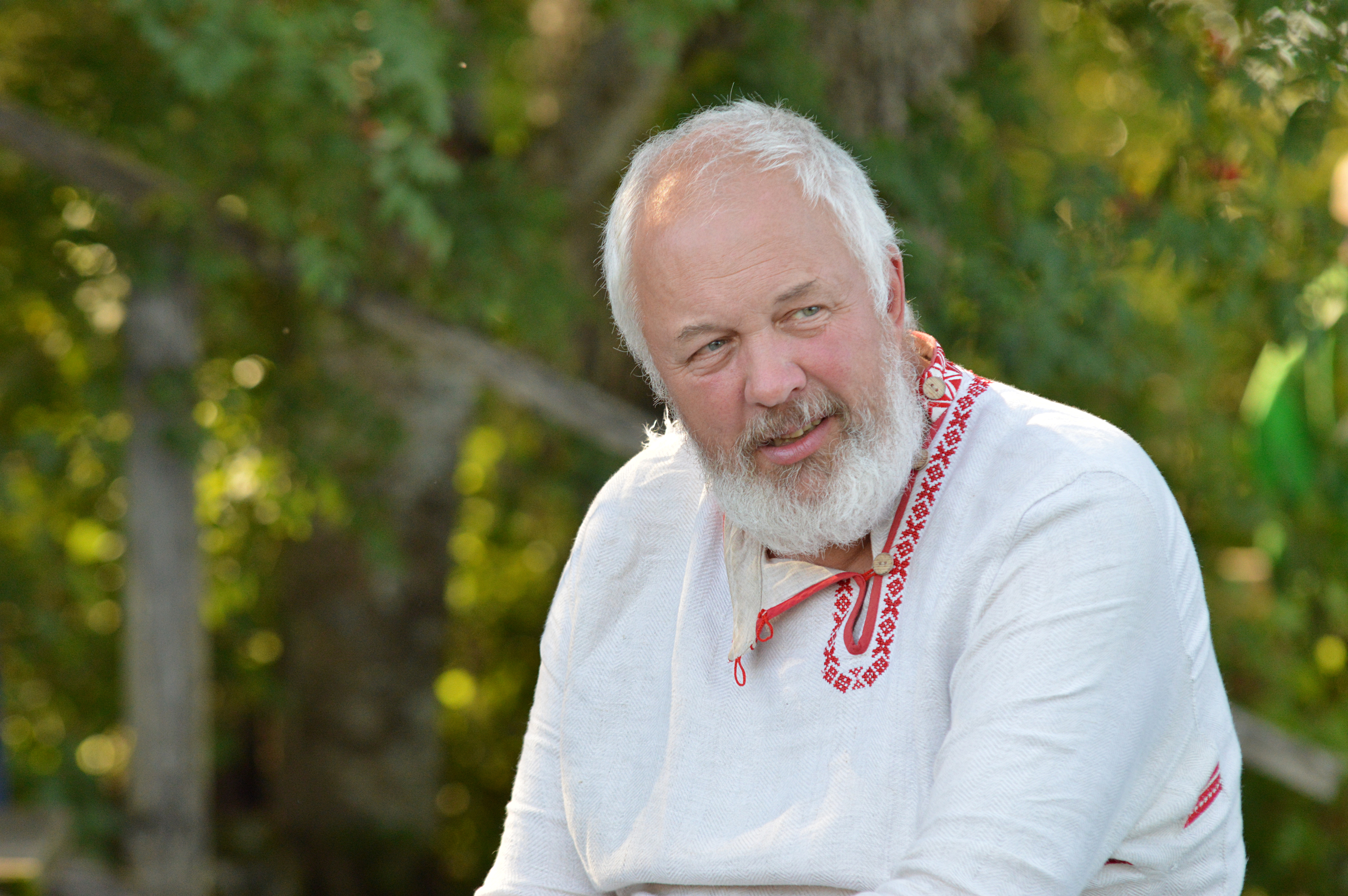 Liinatsura Aado Lintrop. Seto kultuuri festival Radajal.